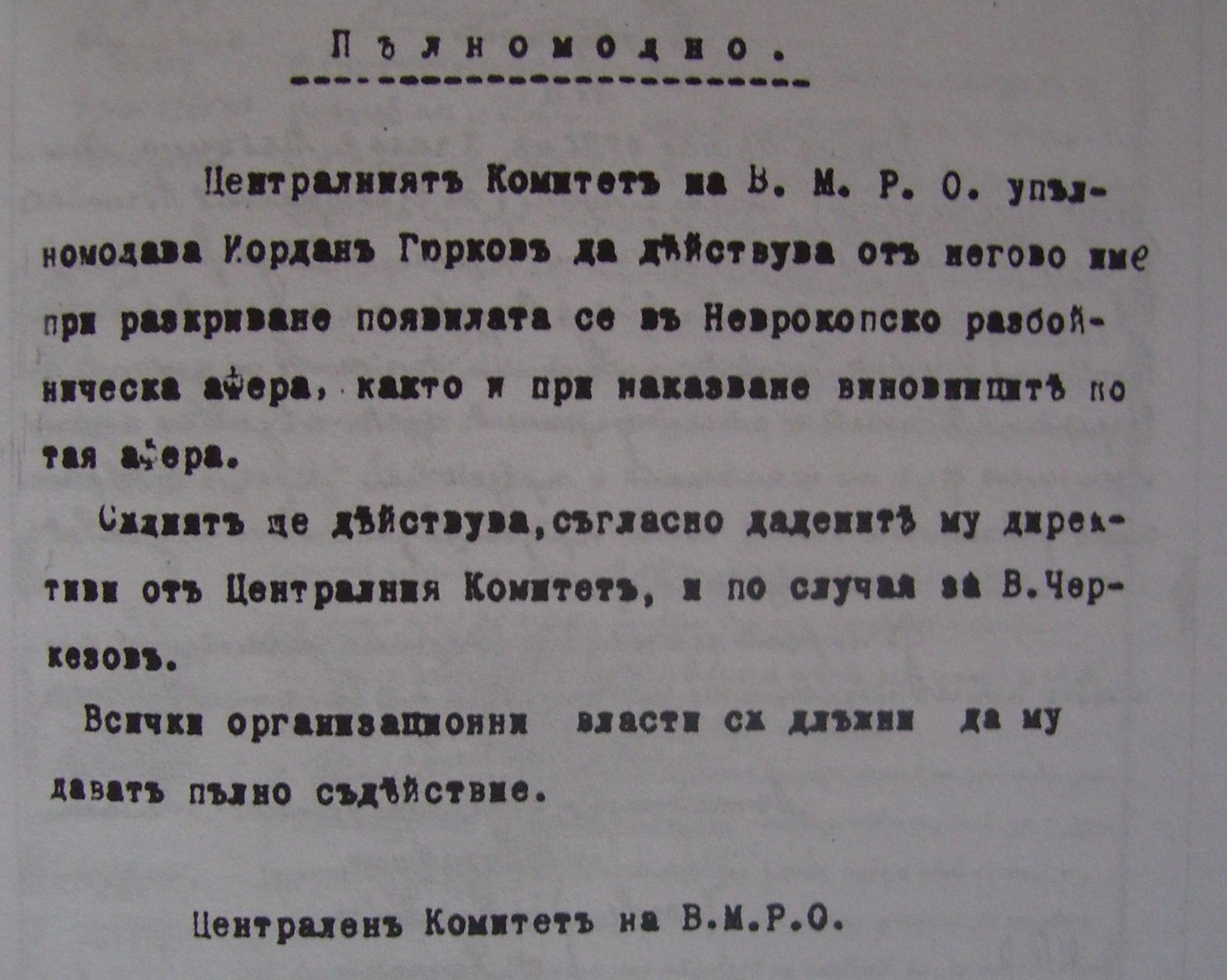 Пълномощно на Йордан Гюрков от участието му в Дъбнишките събития.